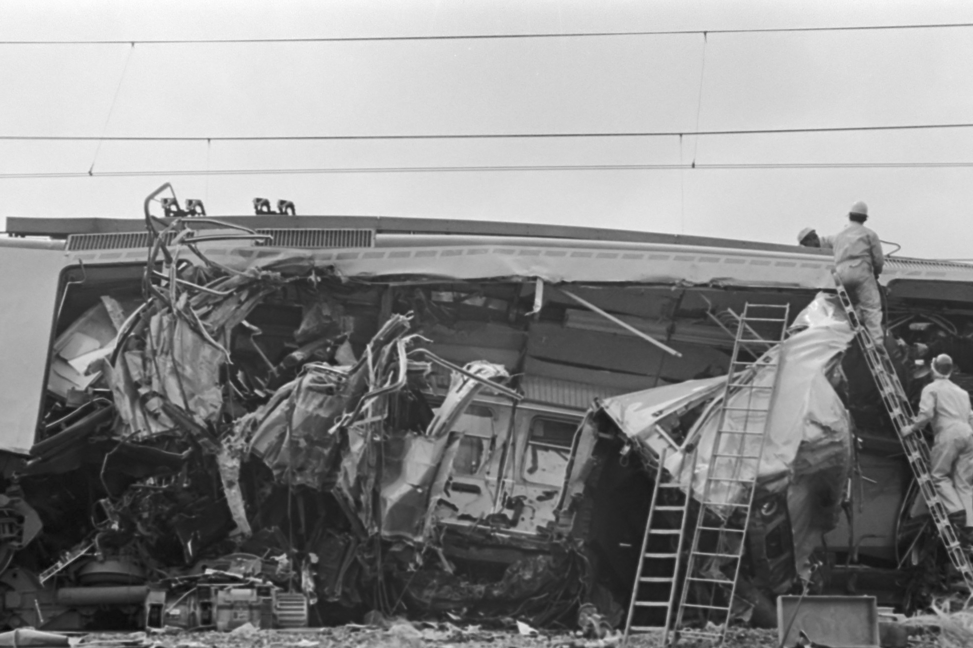 Treinramp bij Schiedam, 24 doden ; reddingswerkzaamheden o.a. met Westerterp 4 mei 1976